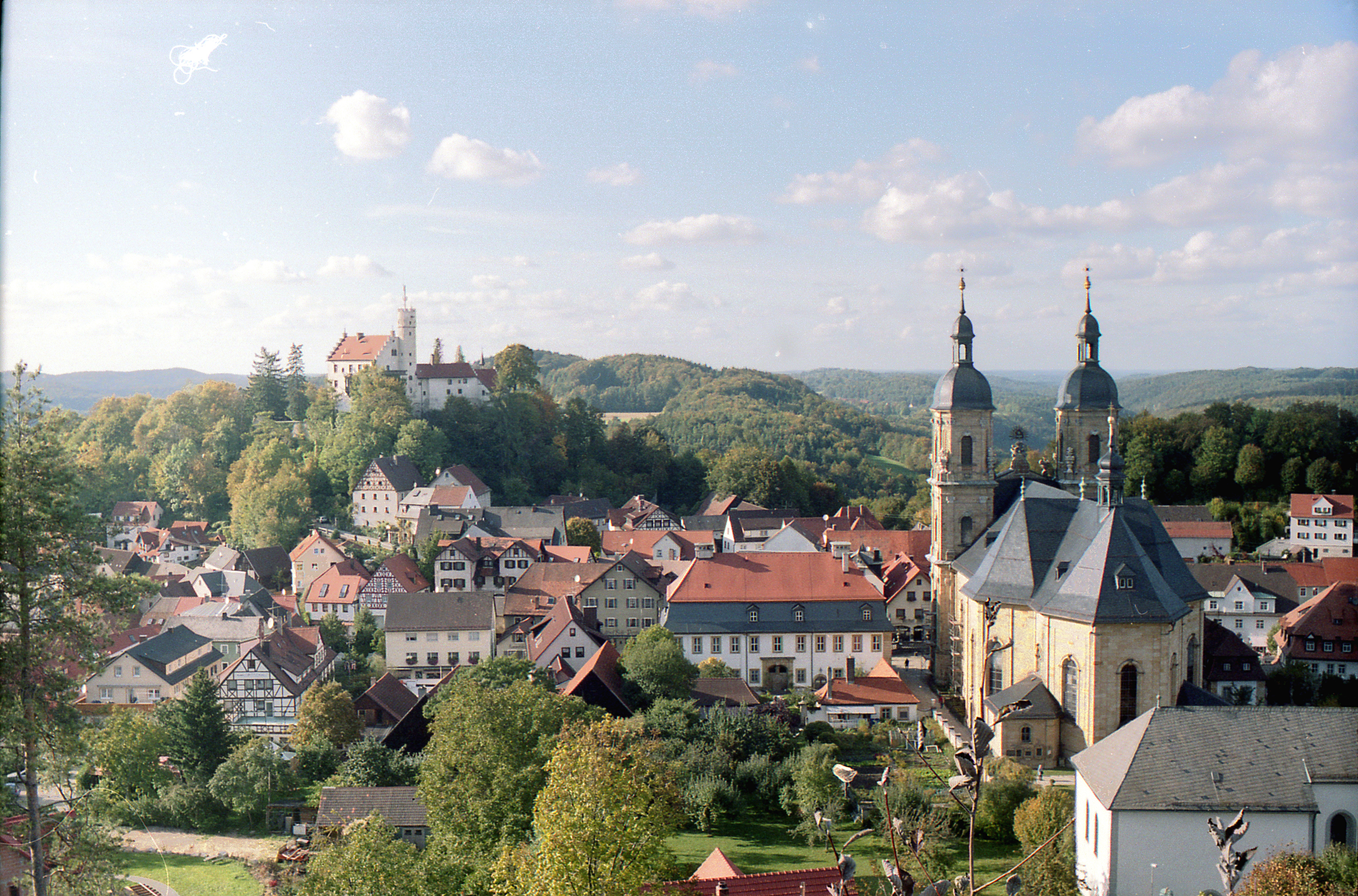 Вид на город Гёсвайнштайн